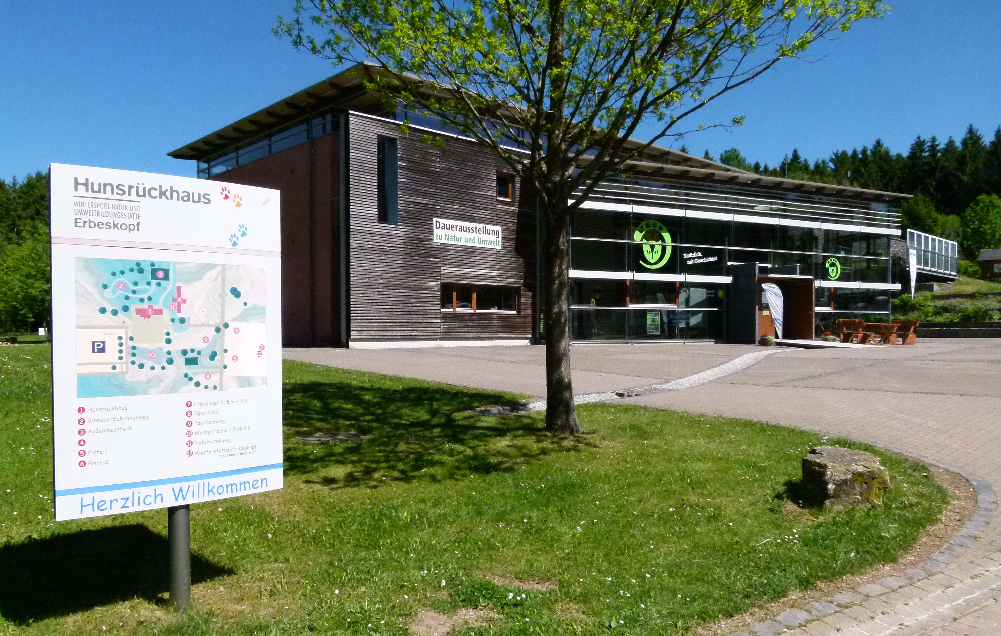 Das "Hunsrückhaus" ist eines von drei zukünftigen "Nationalparktoren" . Hier finden ua Ausstellungen zum Nationalpark statt, Rangertouren starten etc.